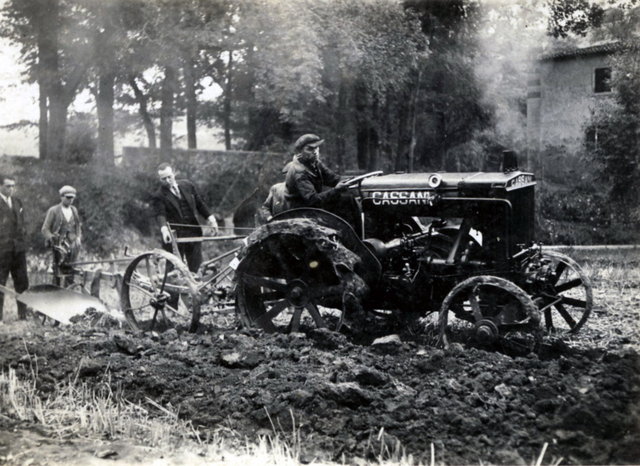 Trattore Cassani 40 HP